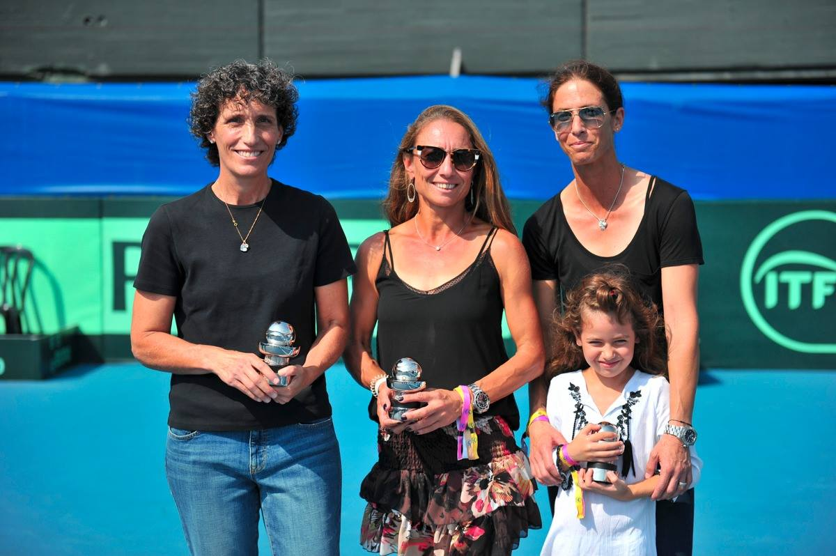 אילנה ברגר, אנה סמשנובה וציפי אובזילר מקבלות את פרס COMMITMENT AWARD